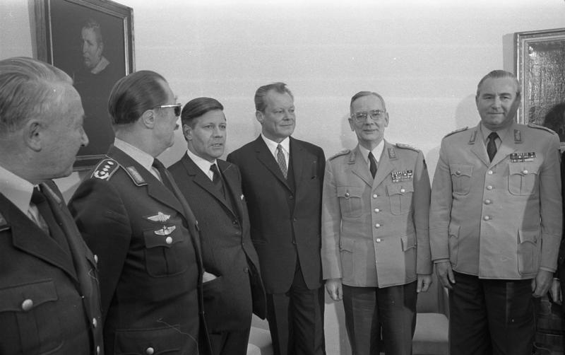 Bundeswehrführung bei Bundeskanzler Brandt in Bonn